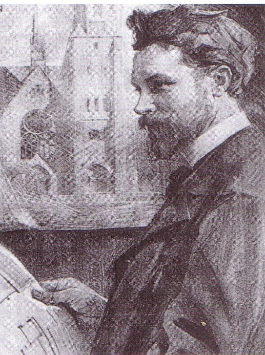 Porträtzeichnung des Architekten Richard Jepsen Dethlefsen (1864–1944)